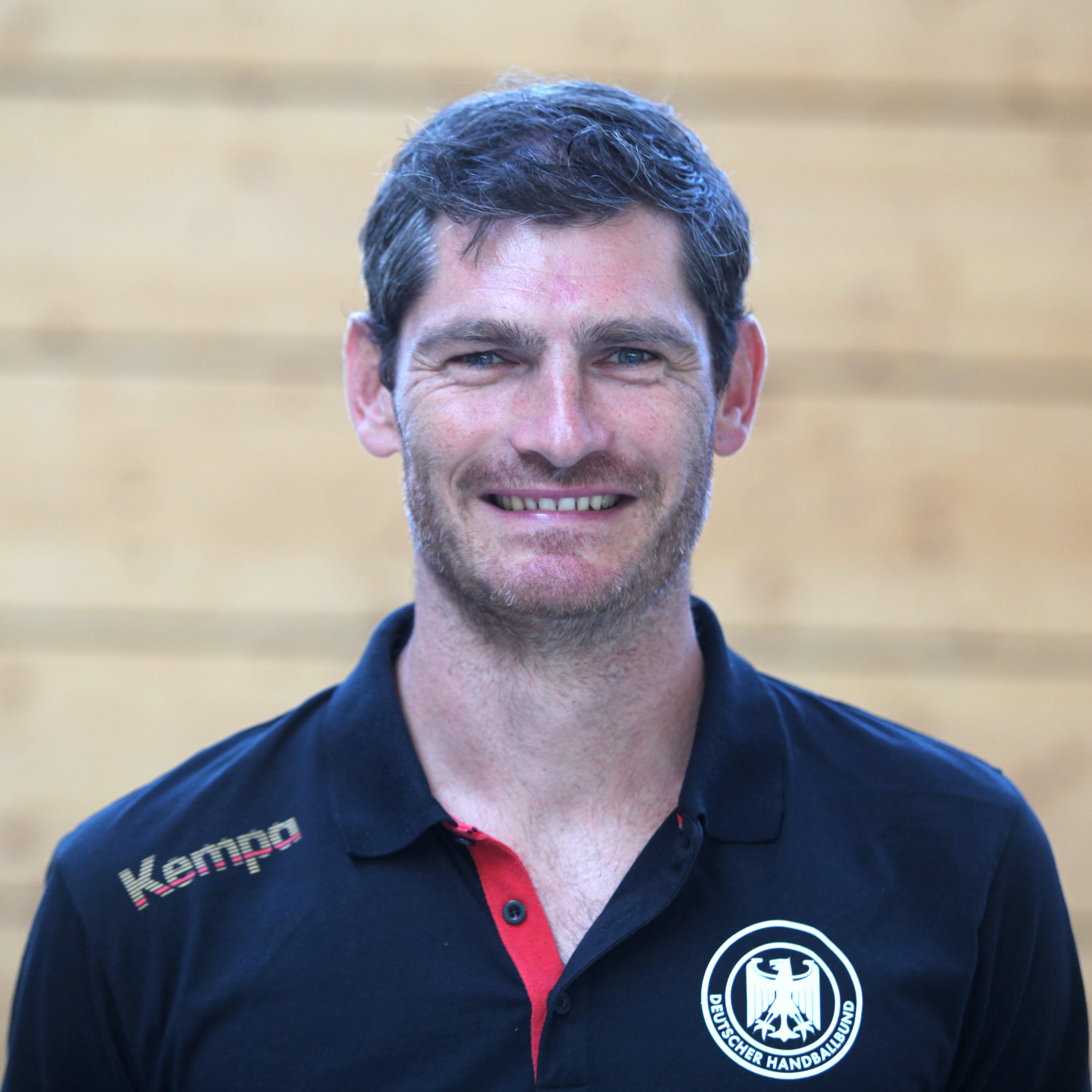 Henning Fritz, Torwarttrainer der Deutschen Handball-Nationalmannschaft am 16. September 2014, in Heilbronn.